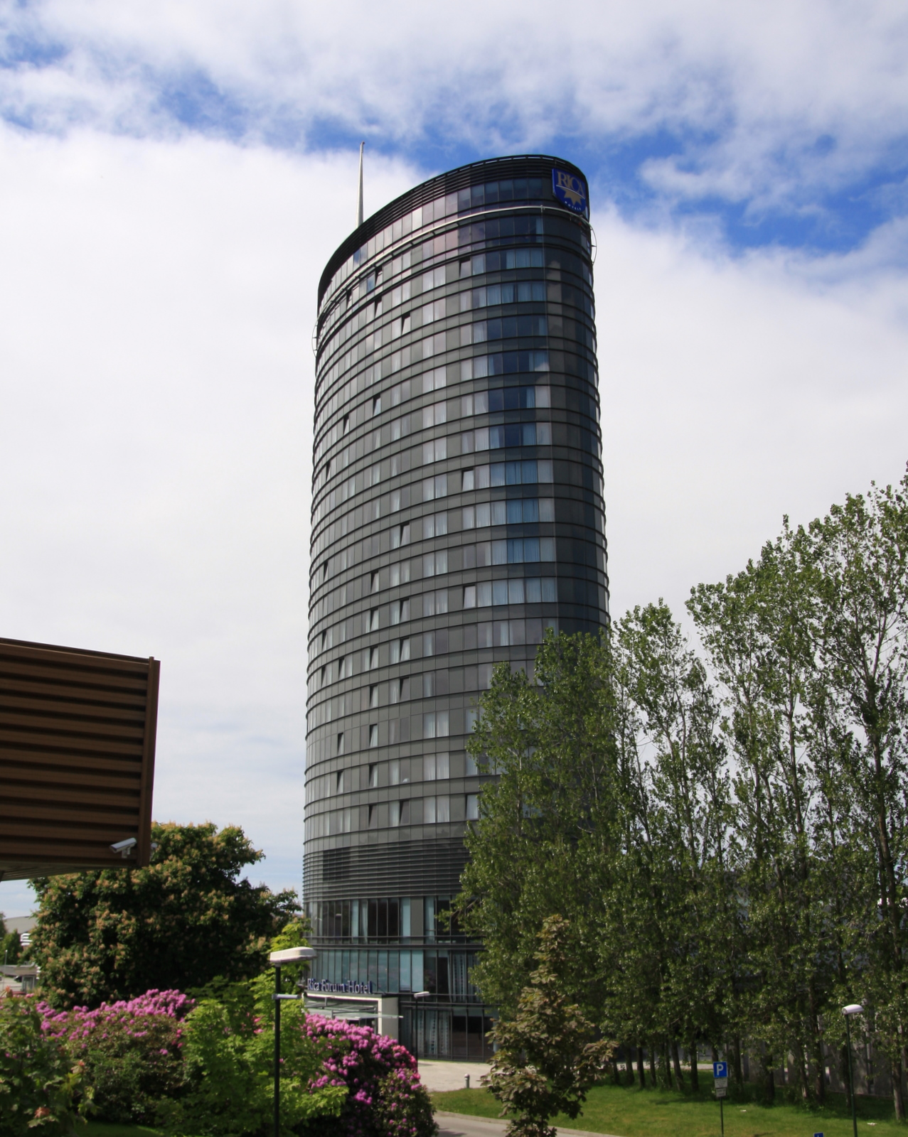 Rica Forum Hotel